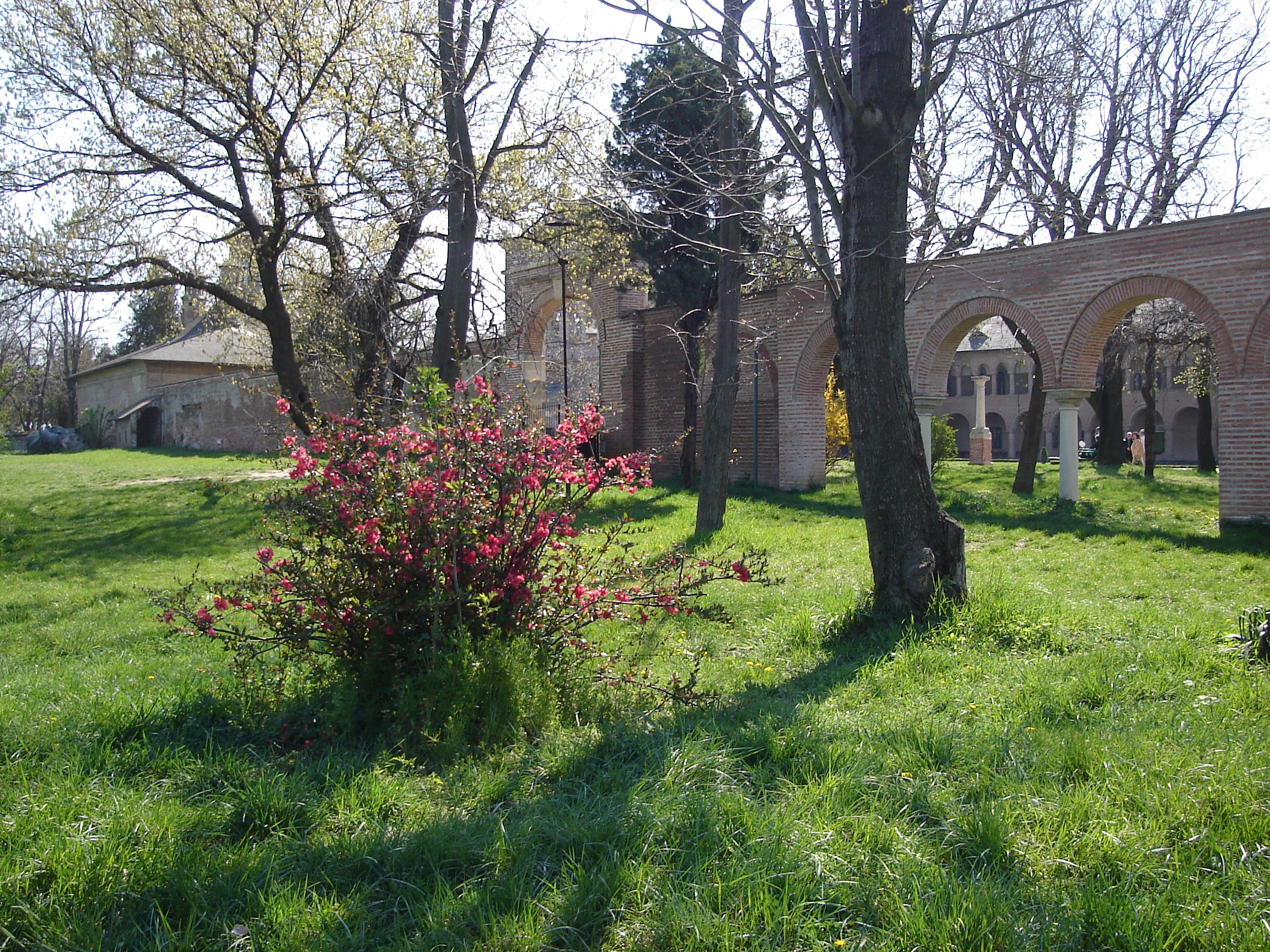 Zid de incintă 07